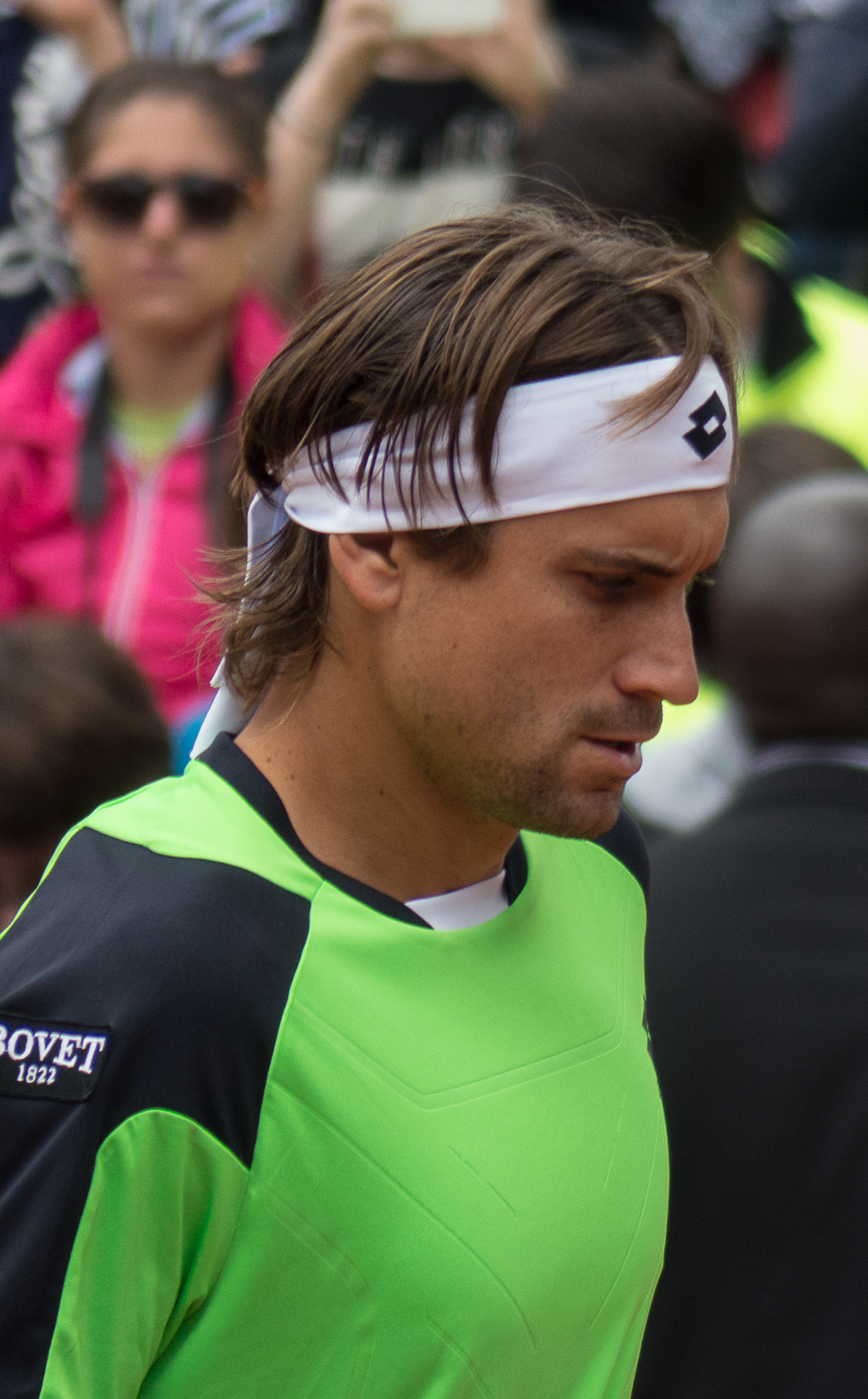 David Ferrer à Roland Garros, lors d'un match du 2e tour contre Albert Montañés.